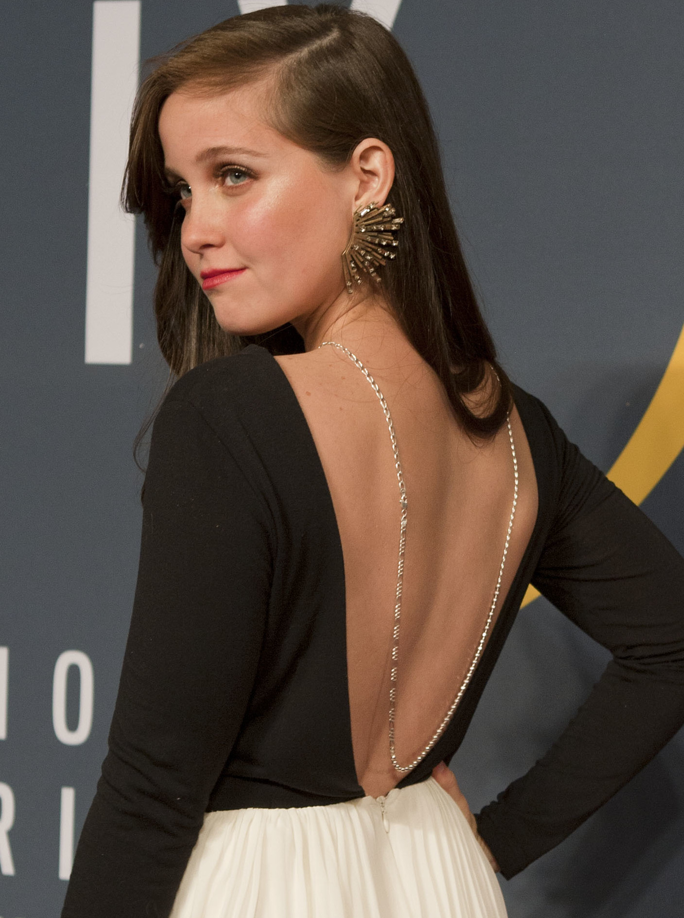 Primera emision de la entrega del Fenix, Premio iberoamericano de Cine, realizado en el Teatro de la Ciudad Esperanza Iris, en el participaron artistas de talla internacional como Viggo Mortensen, Gael Garcia Bernal, Elena Anaya, Irene Azuela, Barbara Mori, Ana de la reguera, Daniel Jimenez Cacho, Maribel Verdu, Mia Maestro, y el Jefe de Gobierno Miguel Angel Mancera entre otros.